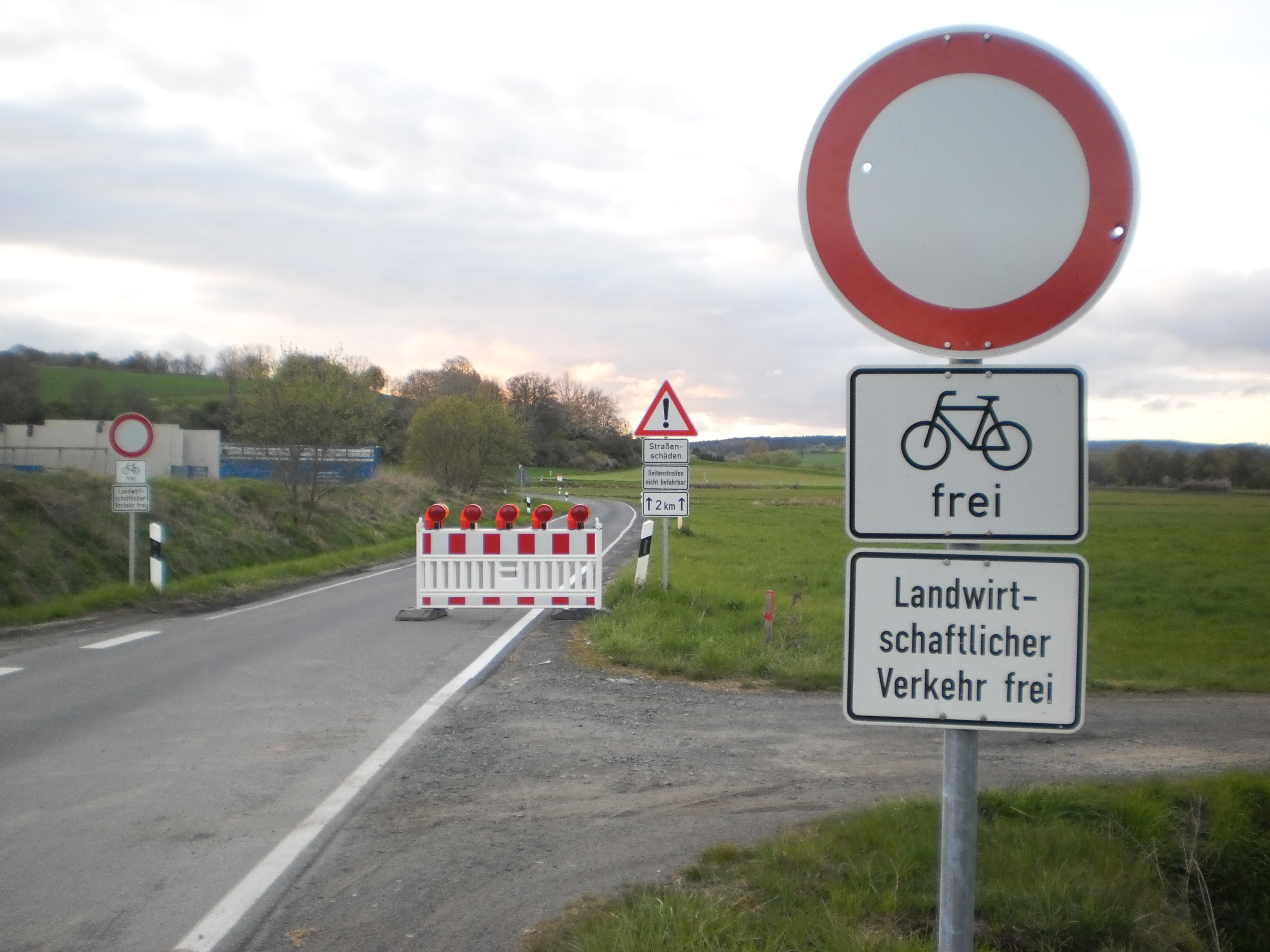 Lahn-Eder-Radweg im Tal der Wetschaft, Die Kreisstrasse K 81 erscheint wegen der hier sichtbaren Beschilderung scheinbar gesperrt bis auf Radverkehr (= "frei") und landwirtschaftlichen Verkehr, jedoch kommen auch relativ schnell fahrende Autos im Gegenverkehr auf dieser Strasse daher: Nur die Einfahrt aus dieser Richtung wurde am Ortsrand nördlich von Lahntal-Sarnau gesperrt, eine Fahrradstrasse ist diese relativ schmale Strasse also (noch) nicht; die Bauarbeiten an der B 252 sind im Jahr 2017 noch nicht abgeschlossen, Pendler, Touristen und Jugendliche mit dem Fahrrad müssen also derzeit noch mit dem Autoverkehr klarkommen, obwohl parallel die alte Bundesstraße 252 in etwa parallel verläuft . (Foto aufgenommen am 23. April 2017).